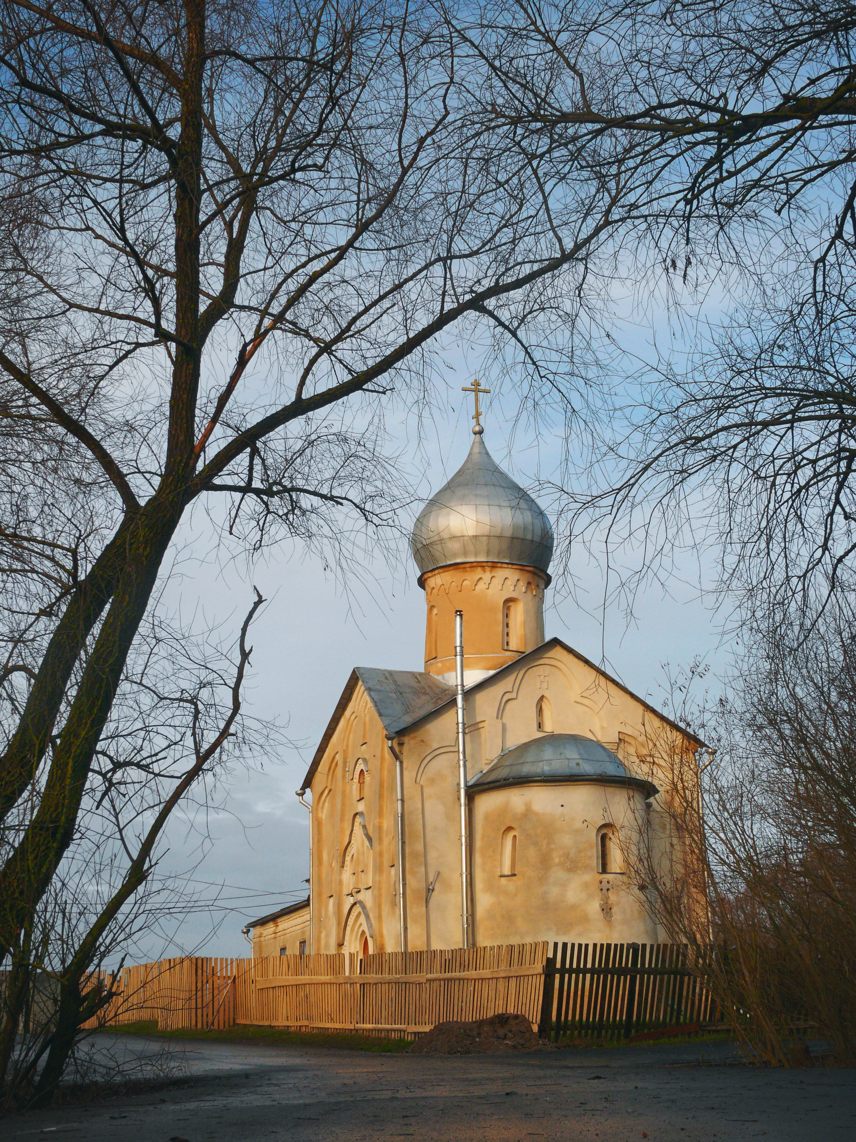 Церковь Иоанна Богослова на Витке: набережная Александра Невского, Великий Новгород, Новгородская область